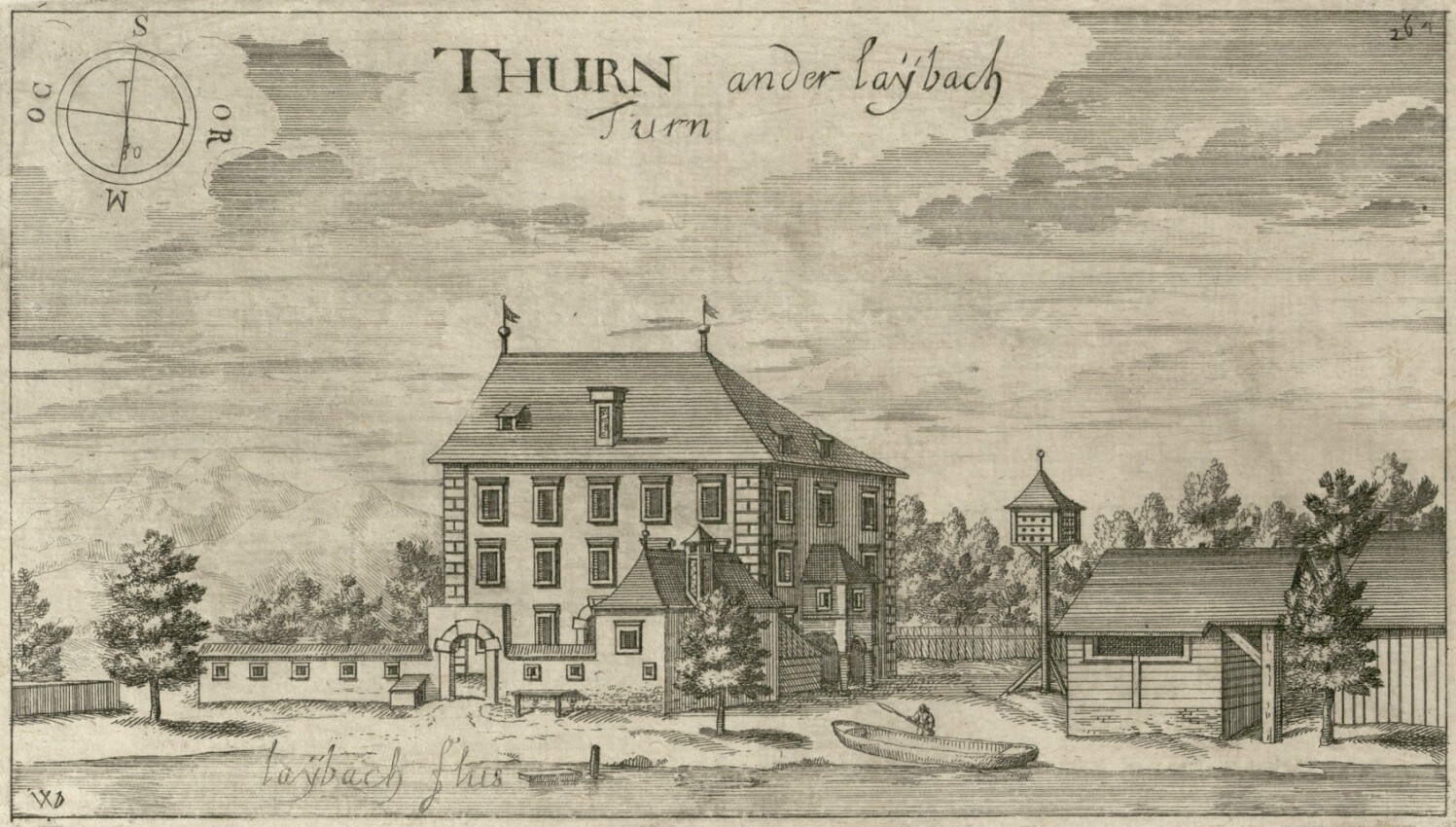 Turn ob Ljubljanici